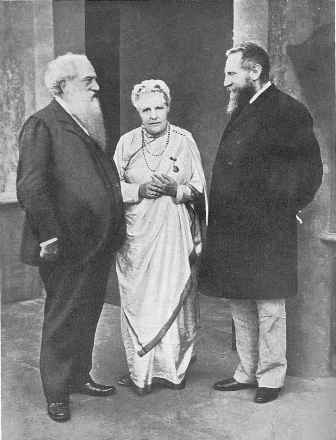 Henry Steel Olcott (1832-1907, links), Annie Besant (1847-1933, mitte), Charles Webster Leadbeater (1847-1934, rechts) in Adyar (Chennai) im Dezember 1905